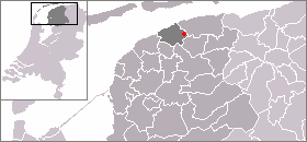 Kaart met de locatie van Lichtaard, gemaakt uit sjabloon van Wikipedia-gebruiker Mtcv